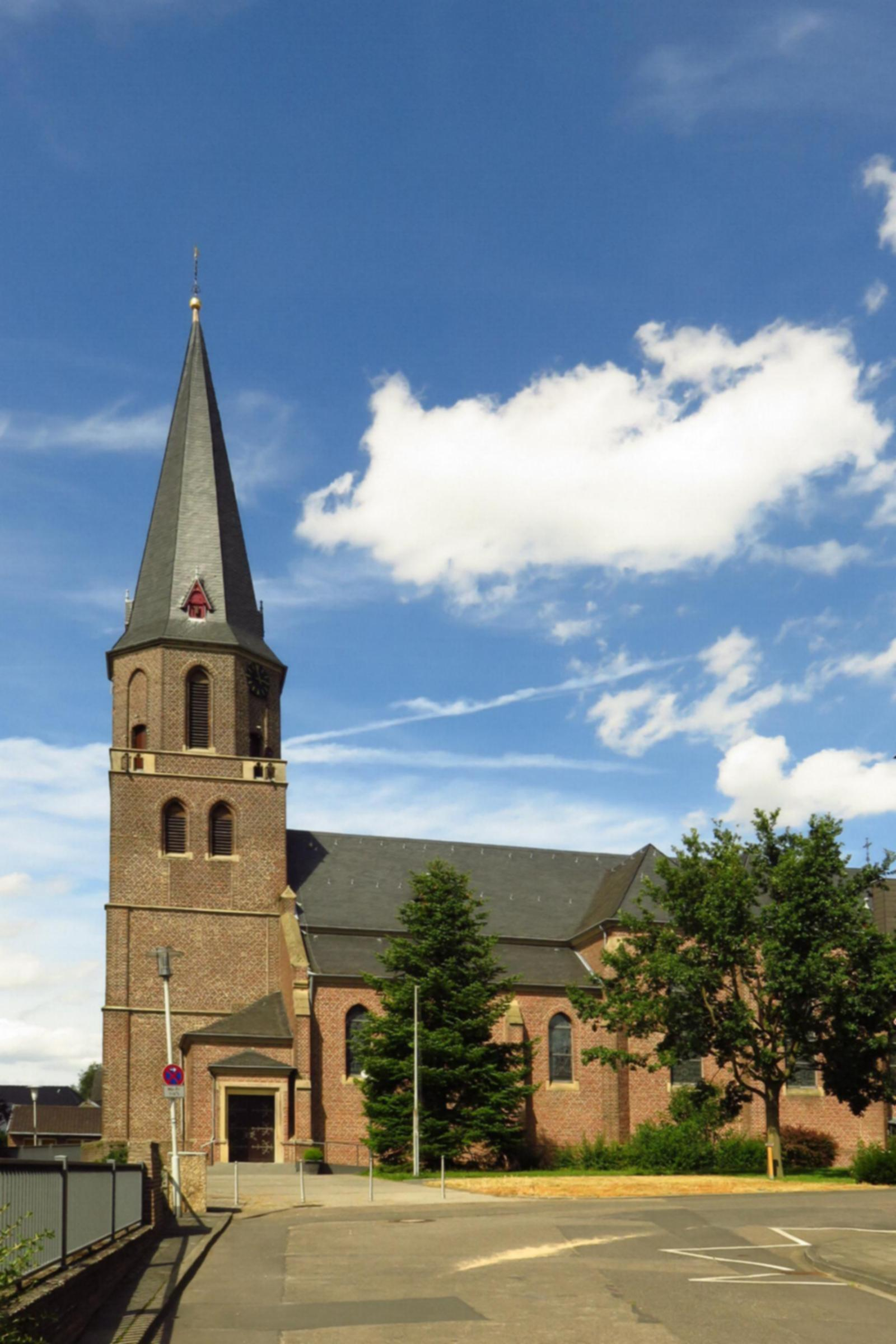 Kirche St. Mariä Himmelfahrt in Wanlo